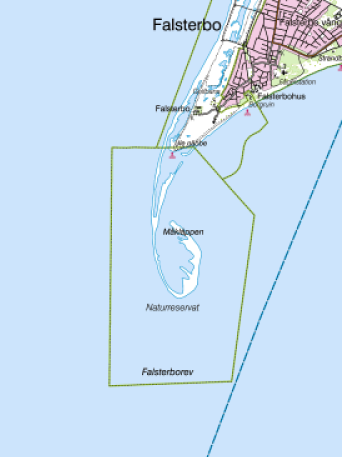 Karta över Måkläppen, Terrängkartan (från Lantmäteriet).